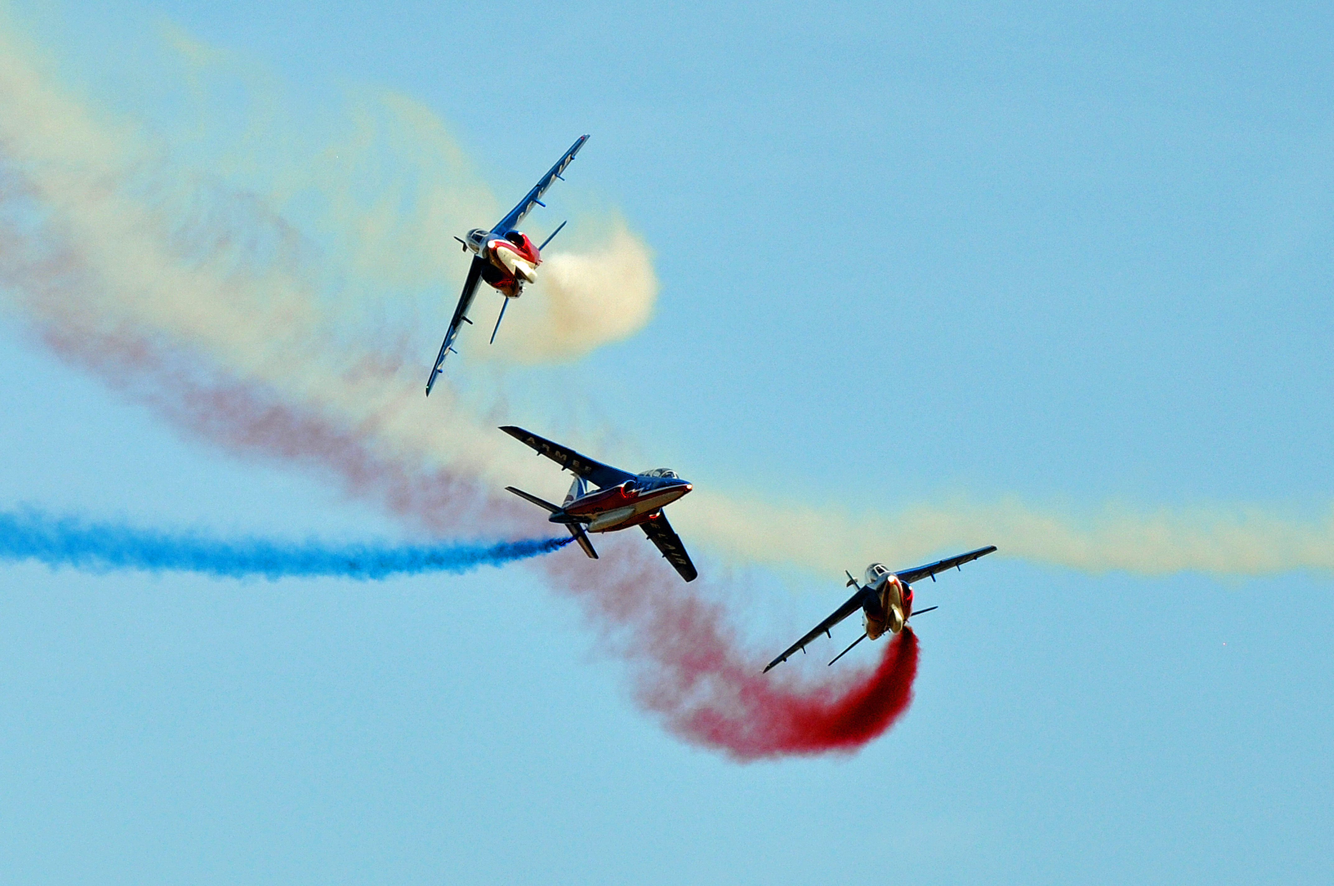 PATROUILLE DE FRANCE PARISAIRLEGEND 2018 AERODROME MELUN-VILLAROCHE